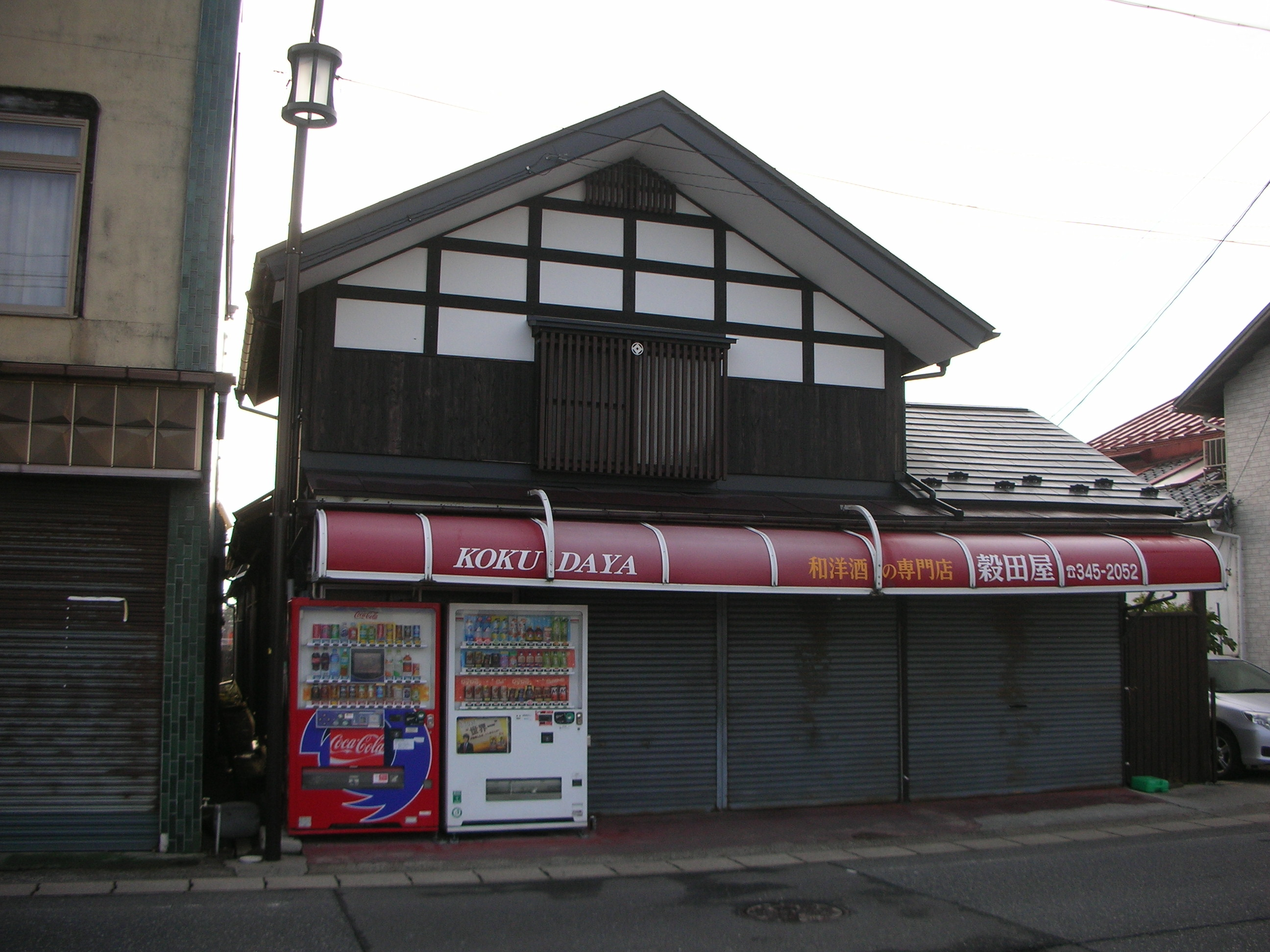 酒の穀田屋（吉岡宿界隈）